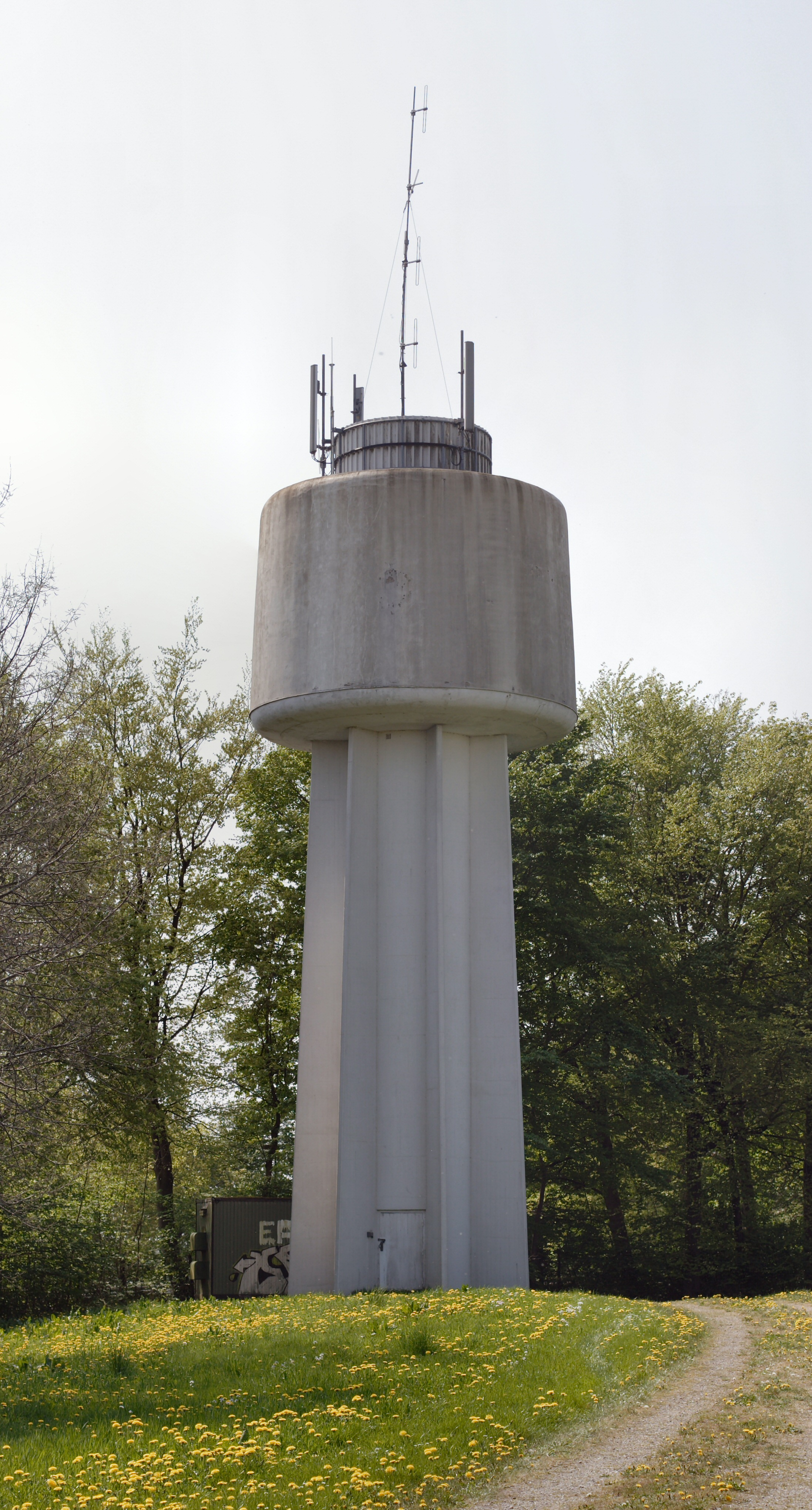 "Det hvide vandtårn" i Haderslev